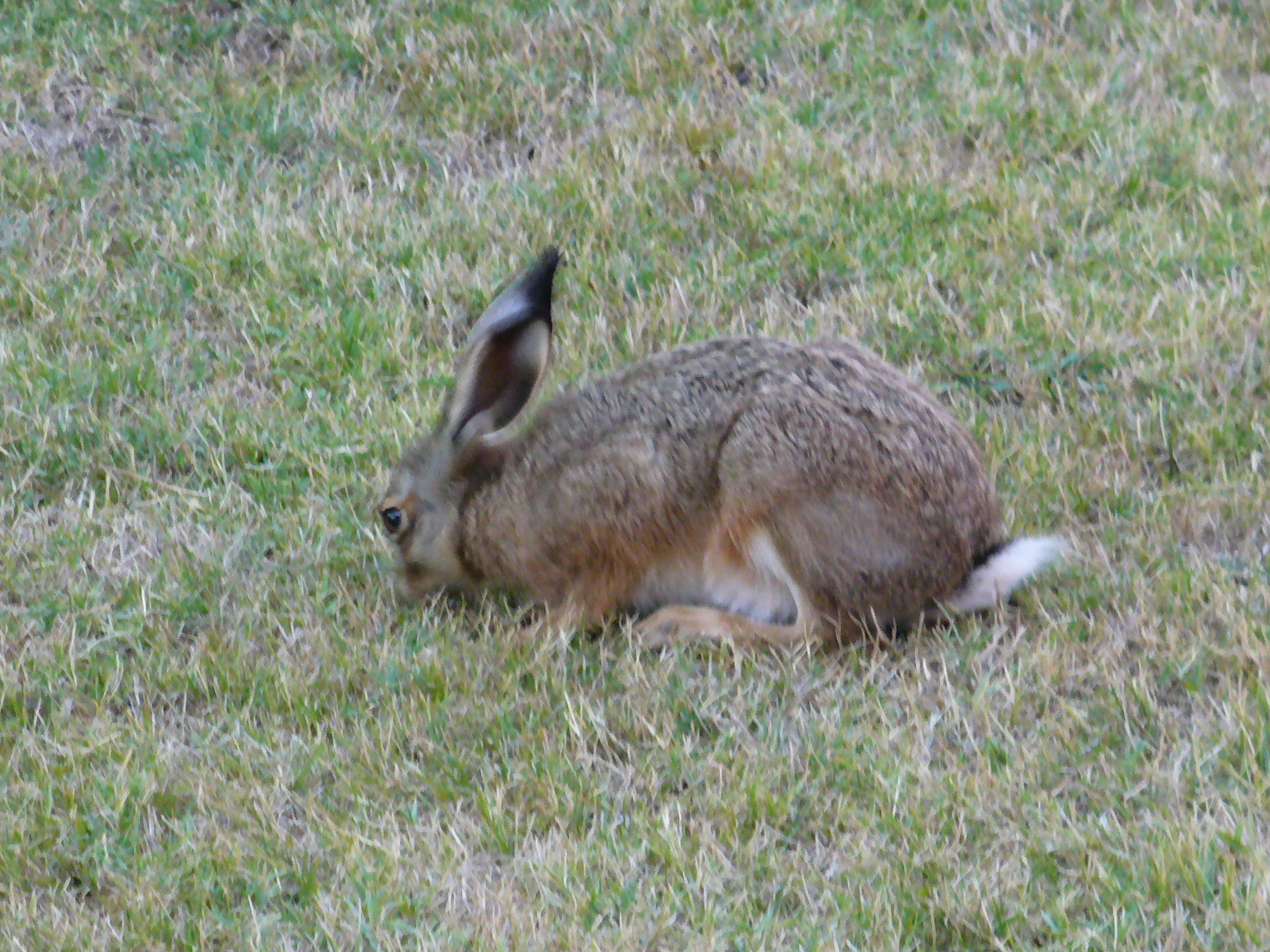 LIEBRE